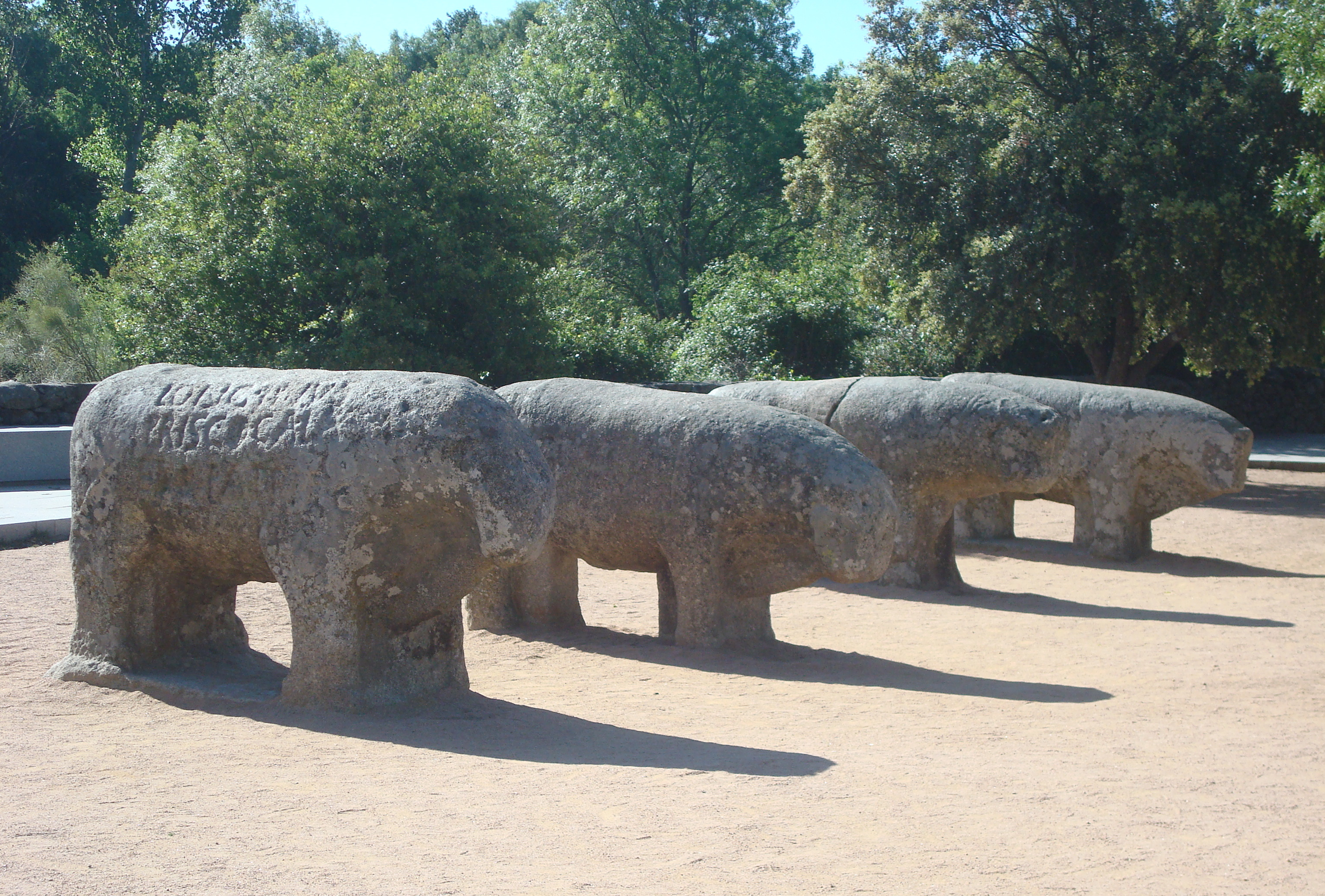 Toros de Guisando (El Tiemblo) - 001